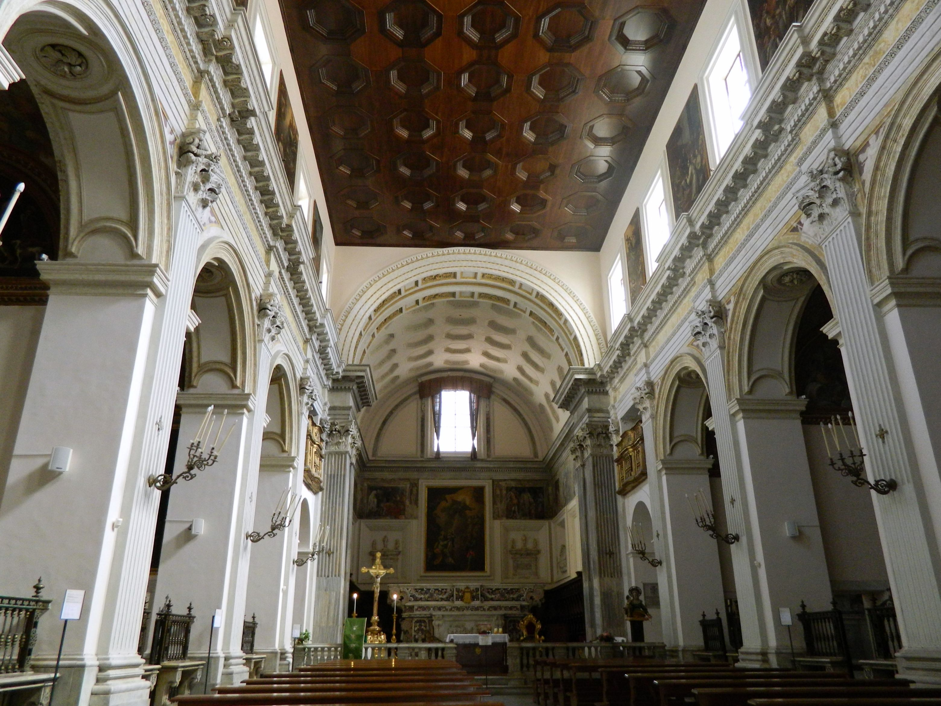 Chiesa di Sant'Anna dei Lombardi (o Monteoliveto) di Napoli - Navata